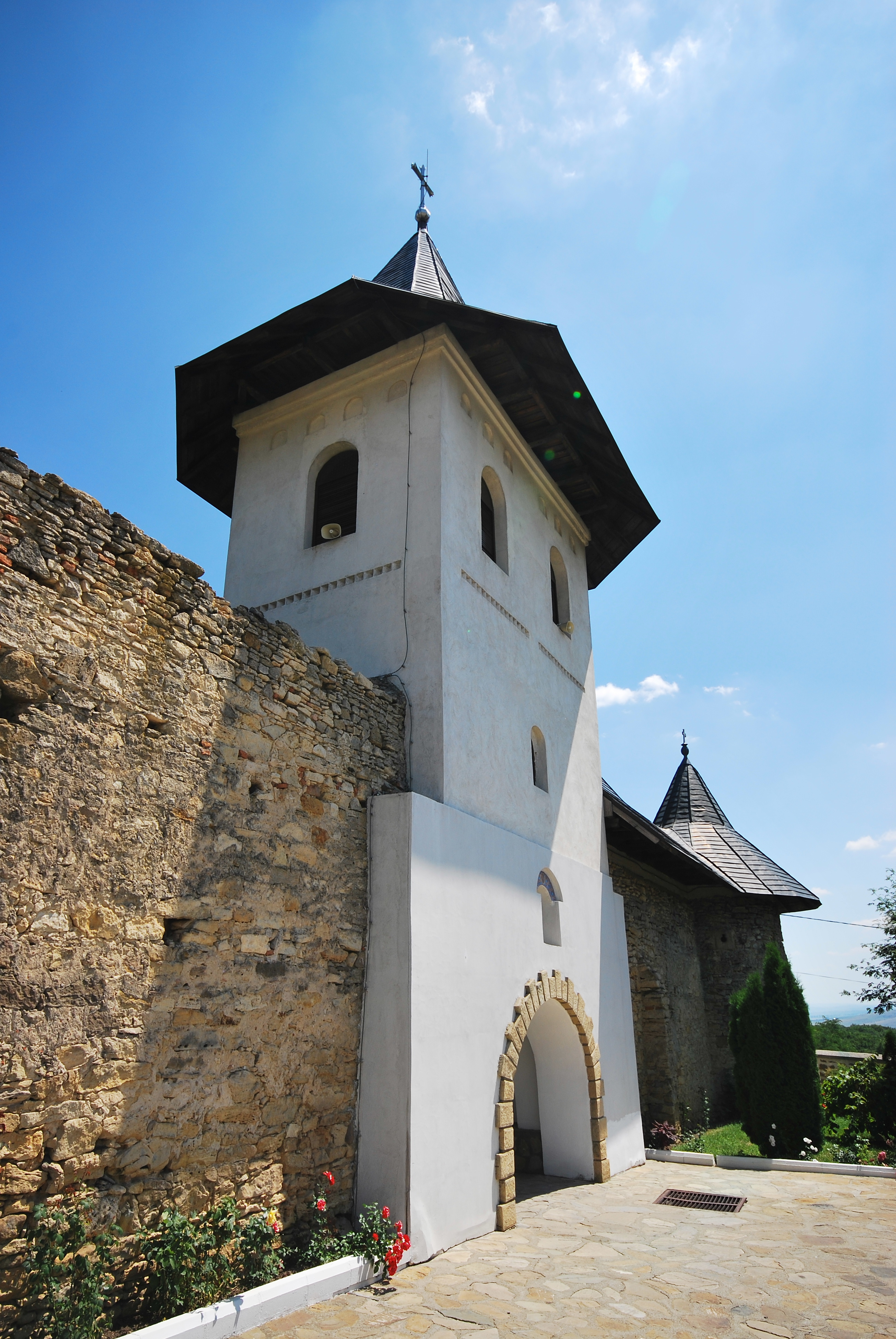 Turn de intrare 02